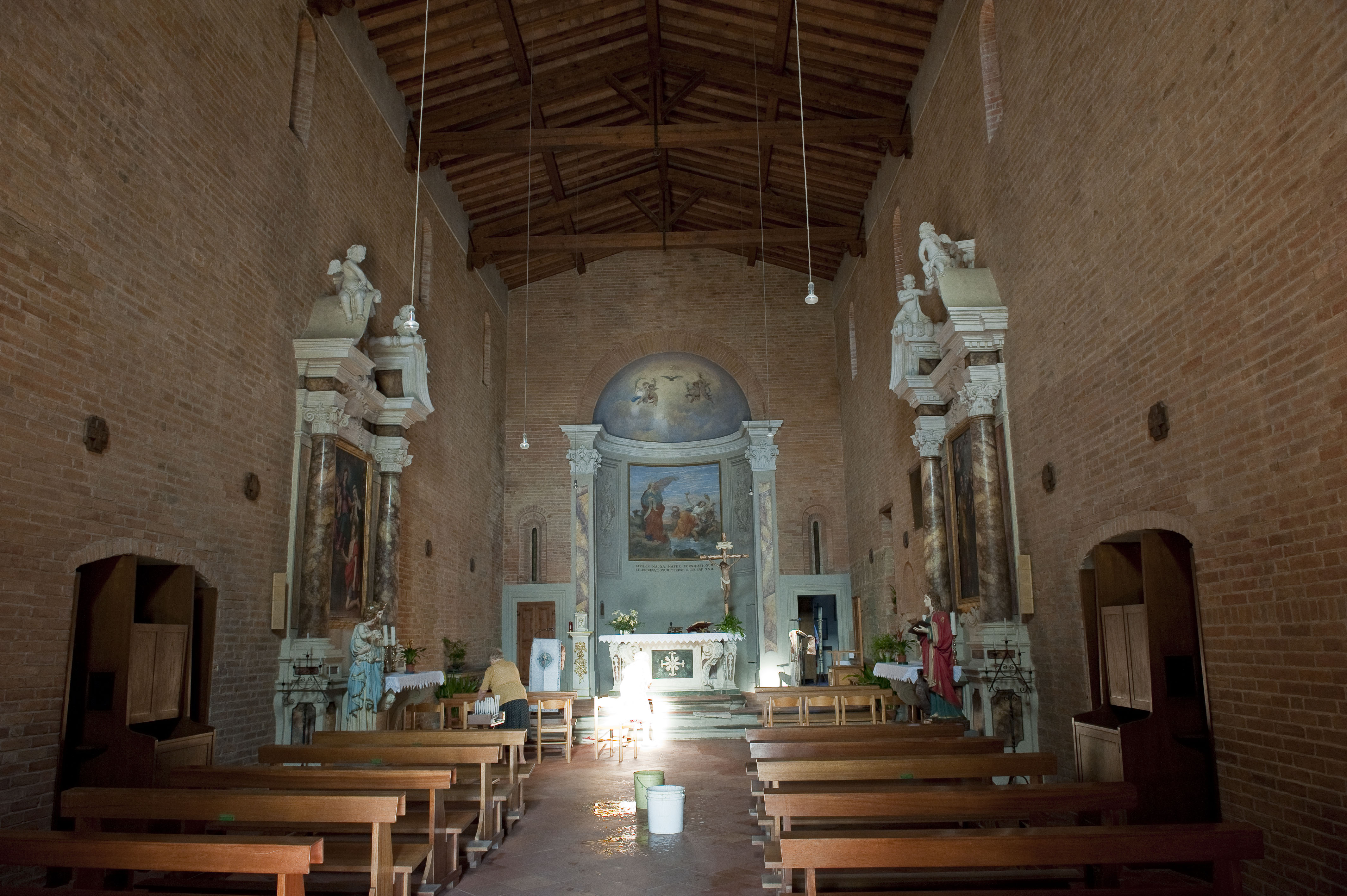 Interno della pieve di San Giovanni Evangelista a Monterappoli (Empoli)